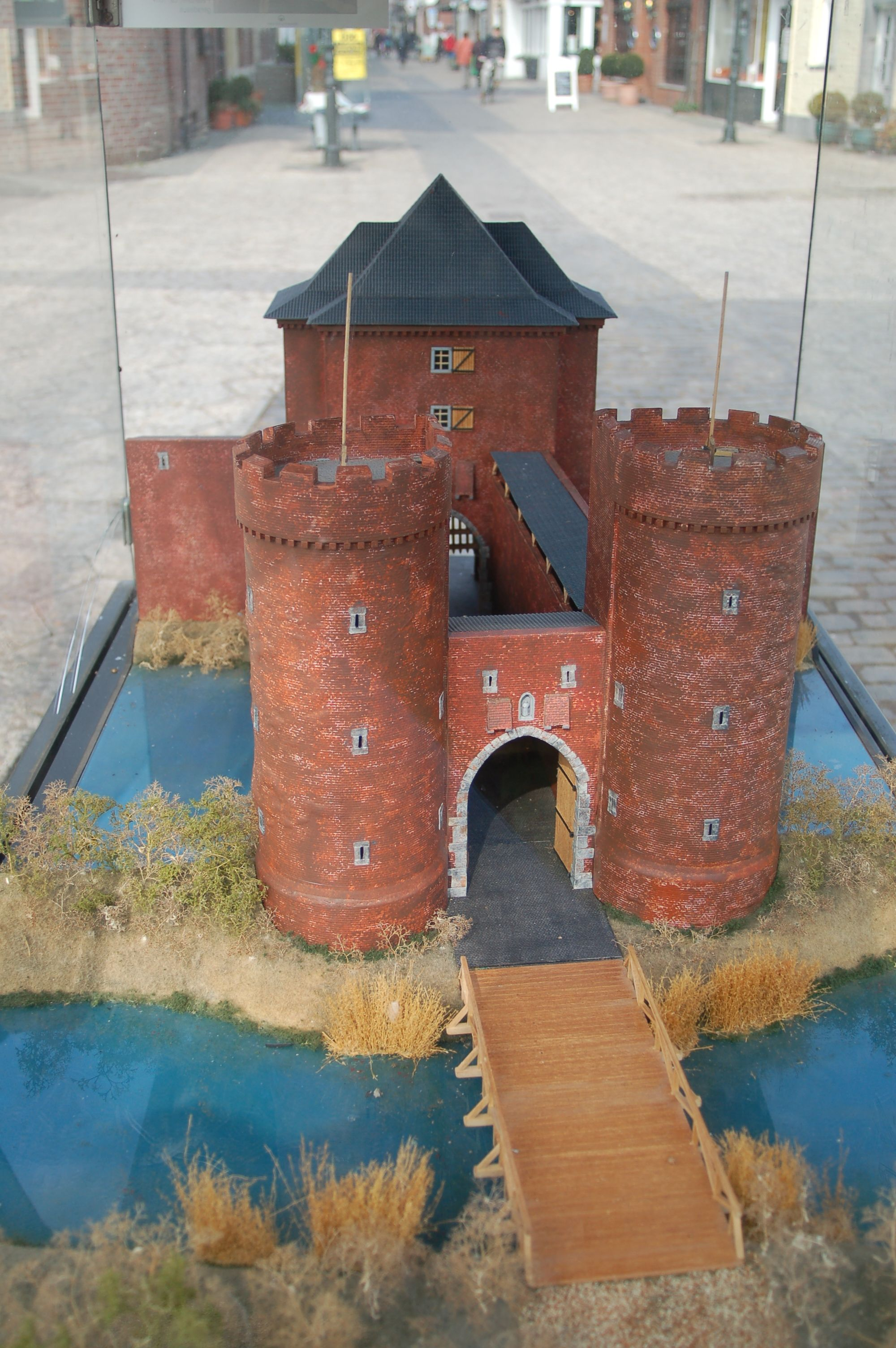 Ein Modell des ehem. Petertores in Kempen. Entworfen und gebaut von Patrick Rath